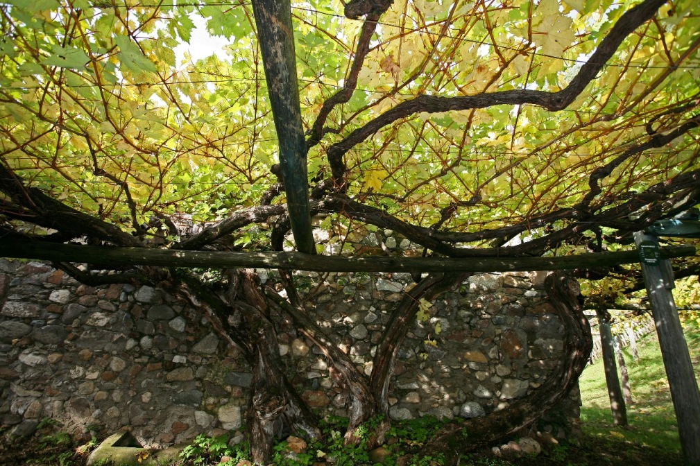 Vigne de plus de 350 ans à Castel Katzenzungen, Prissiano